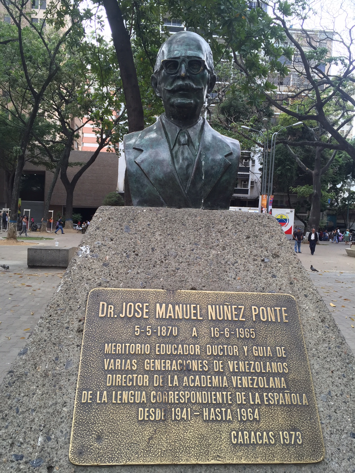 Busto del pedagogo venezolano José Manuel Nuñez Ponte (1870-1965).